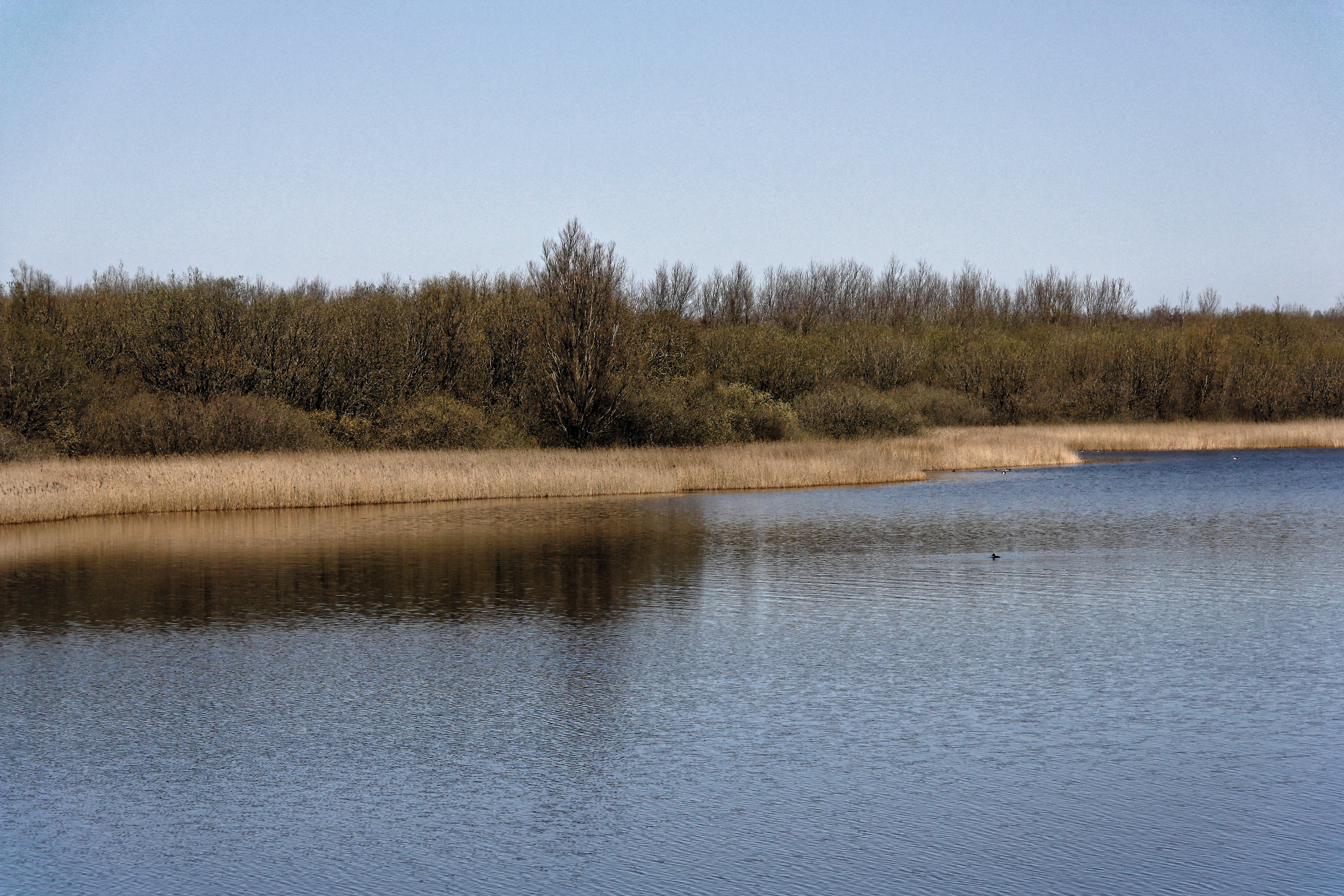 Katinger Watt, Wiesenteil, Blick vom Eiderdeich auf den Schilfgürtel; Bereich im FFH-Gebiet DE-1719-391 „Untereider“ und im EU-Vogelschutzgebiet DE-0916-491